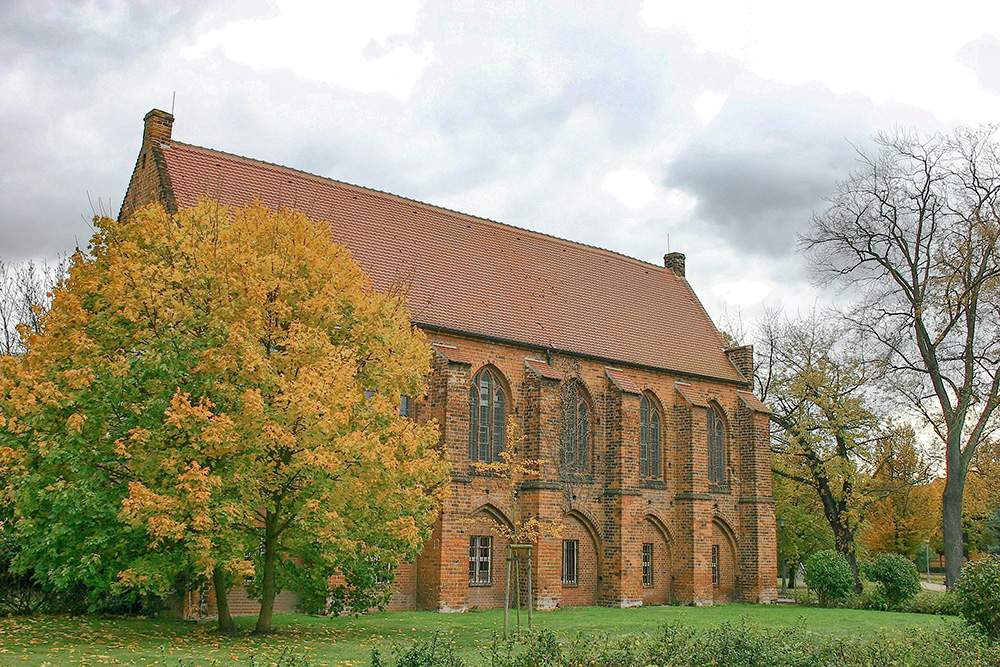 Stendal Mönchskirchhof 1, Refektorium, Altbau der Stadtbibliothek Stendal, Baudenkmal